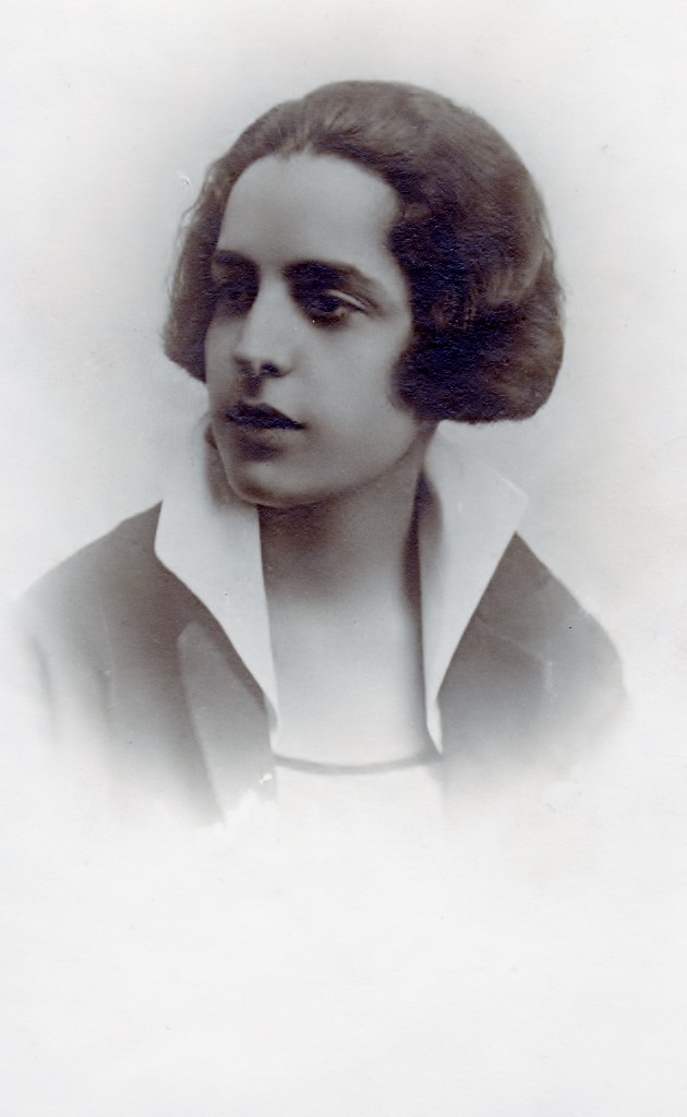 Maria Poliduri.